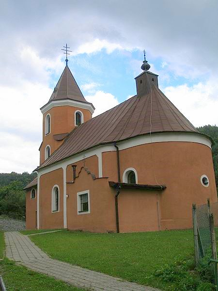 Kvačany obec v Šarišskej vrchovine, okr.Prešov, región Šariš